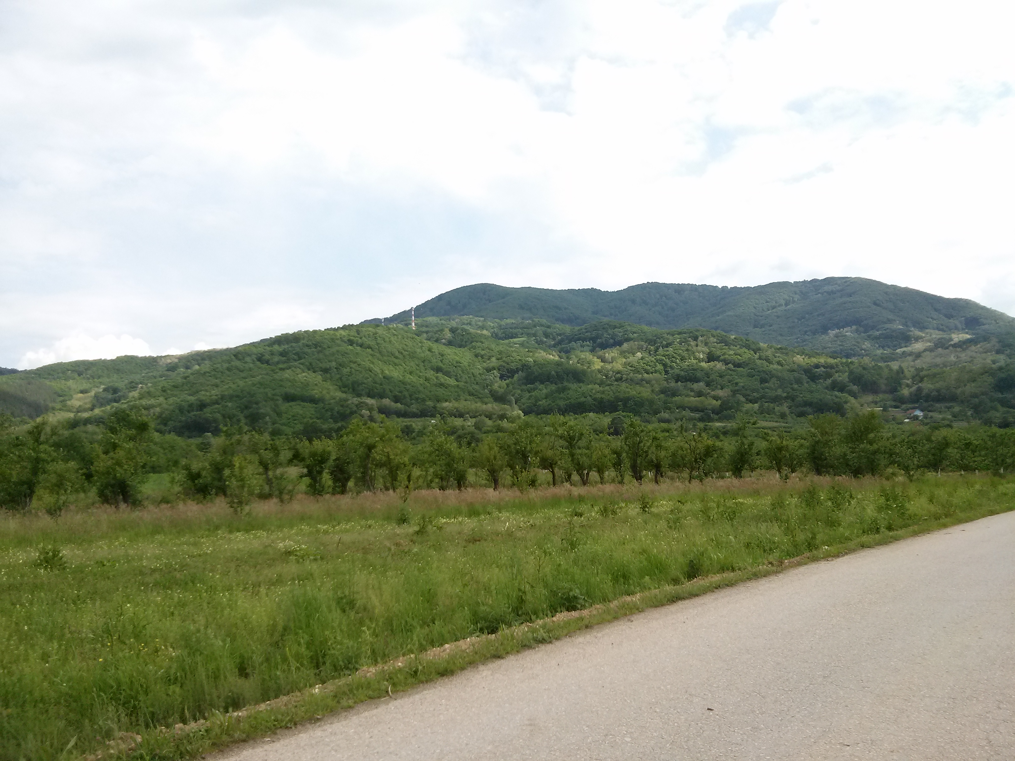 Srpski (latinica): Planina Kukavica